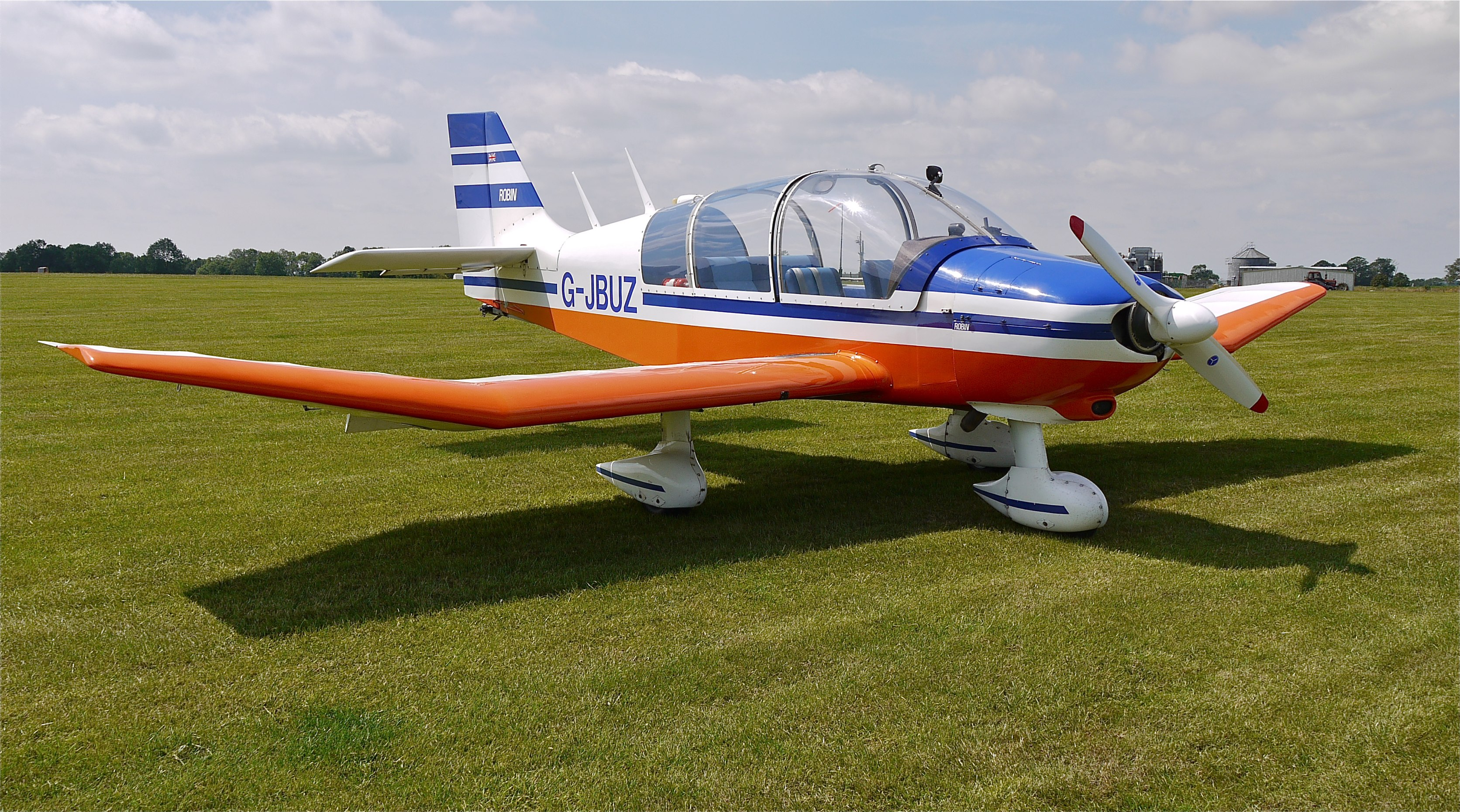 Panasonic G1 14-45 Lens iA mode